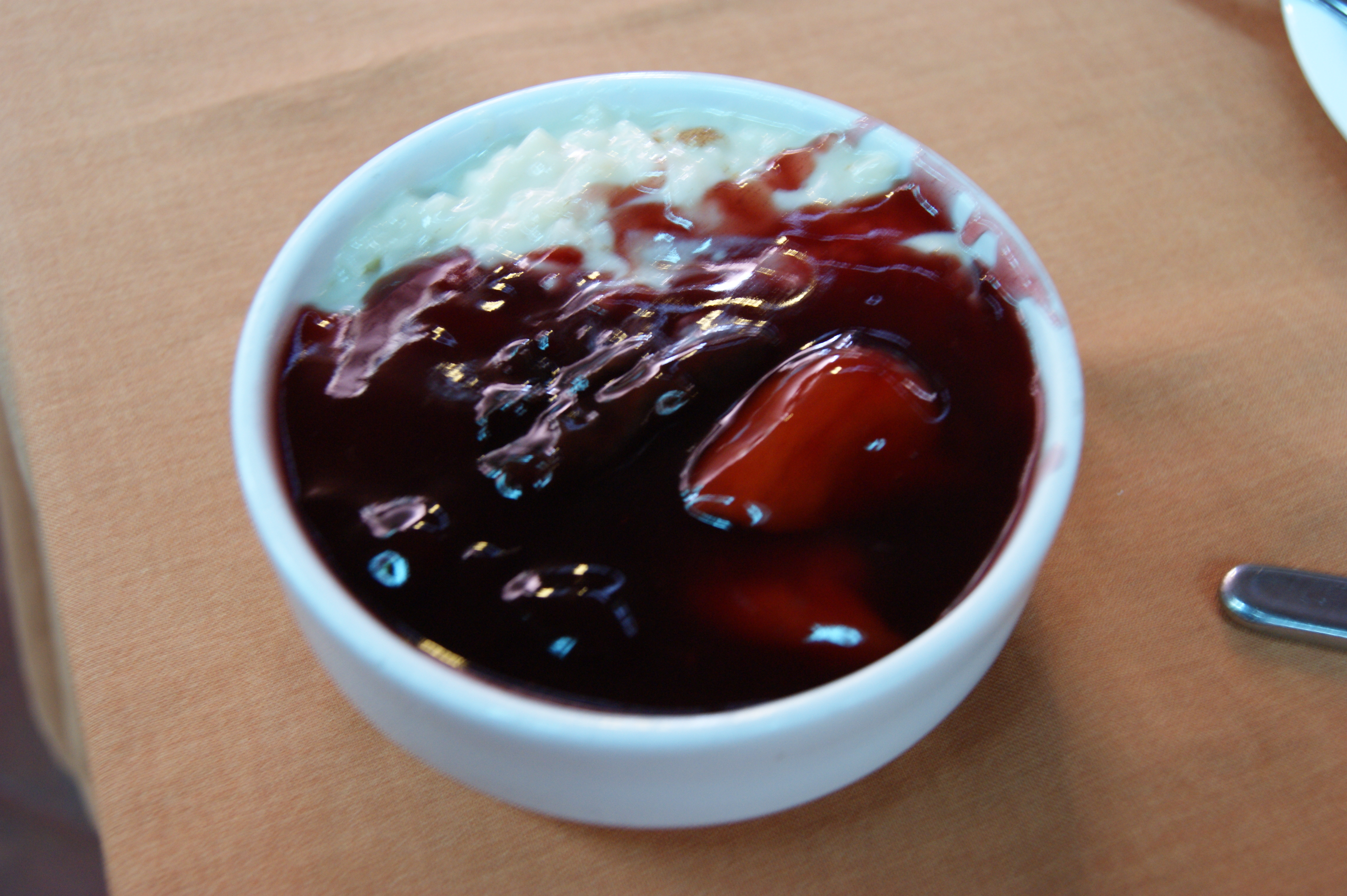 Clásico: mazamorra morada y arroz con leche. Restaurant El Bolivariano, Lima-Perú.